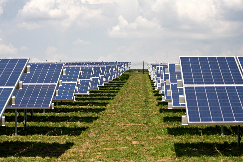 Solarpark Oberhinkofen, Regensburg